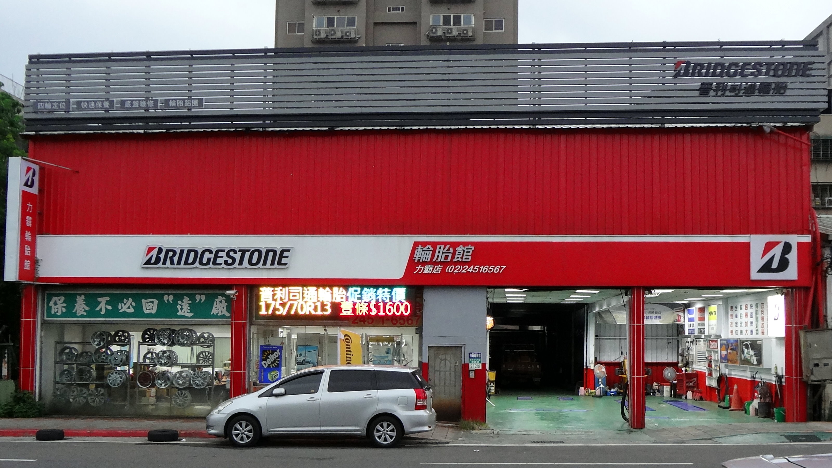 力霸輪胎五金股份有限公司，是台灣普利司通認證之連鎖店，位於基隆市七堵區實踐路212號。